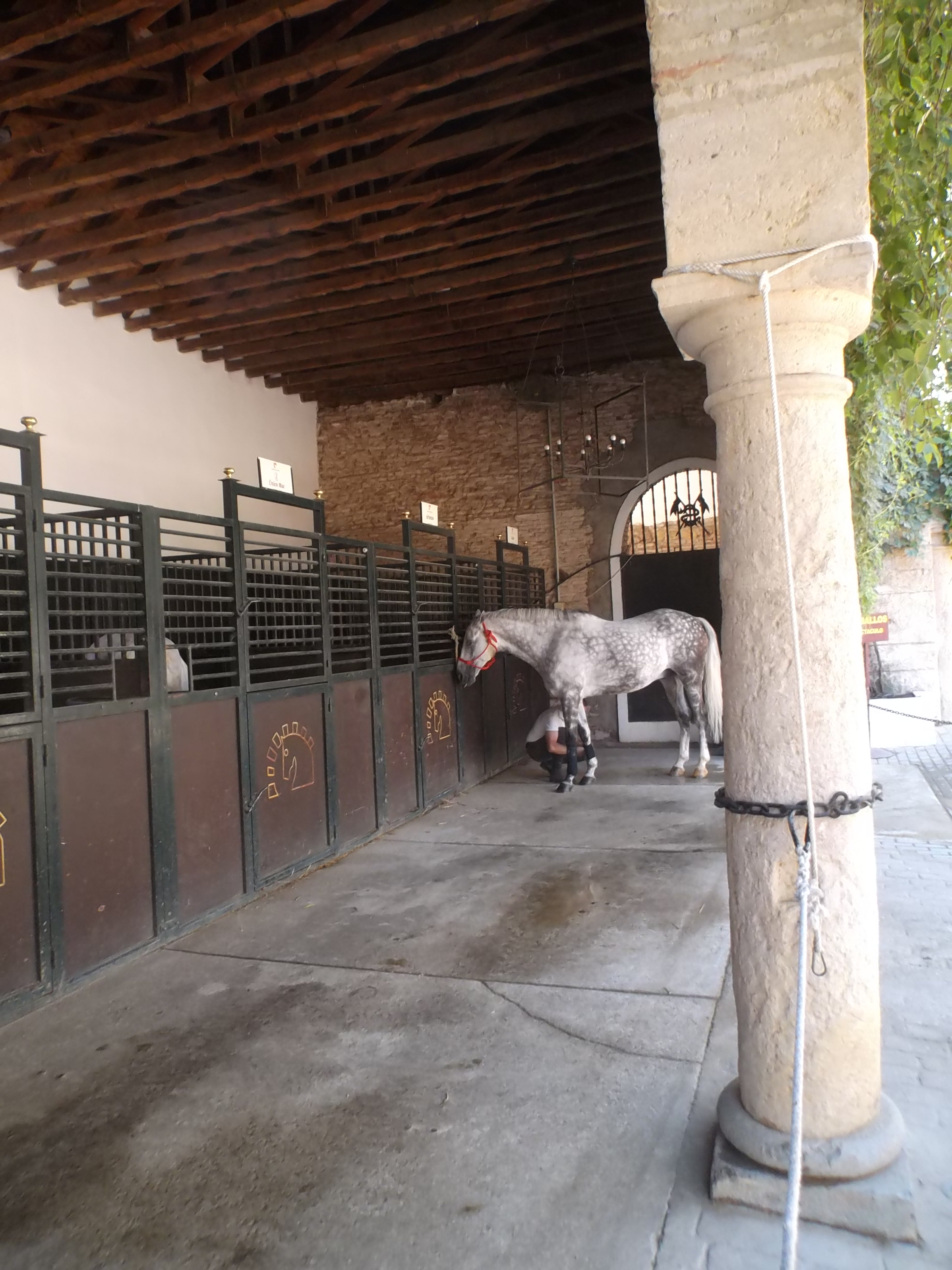 Caballerizas Reales de Cordoba, España.